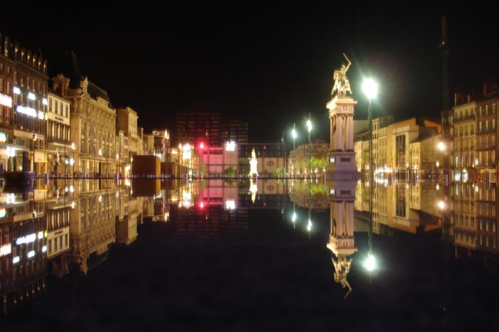 Description : La place de Jaude la nuit, depuis un bassin à jet d'eau. Source : Rabusier Licence